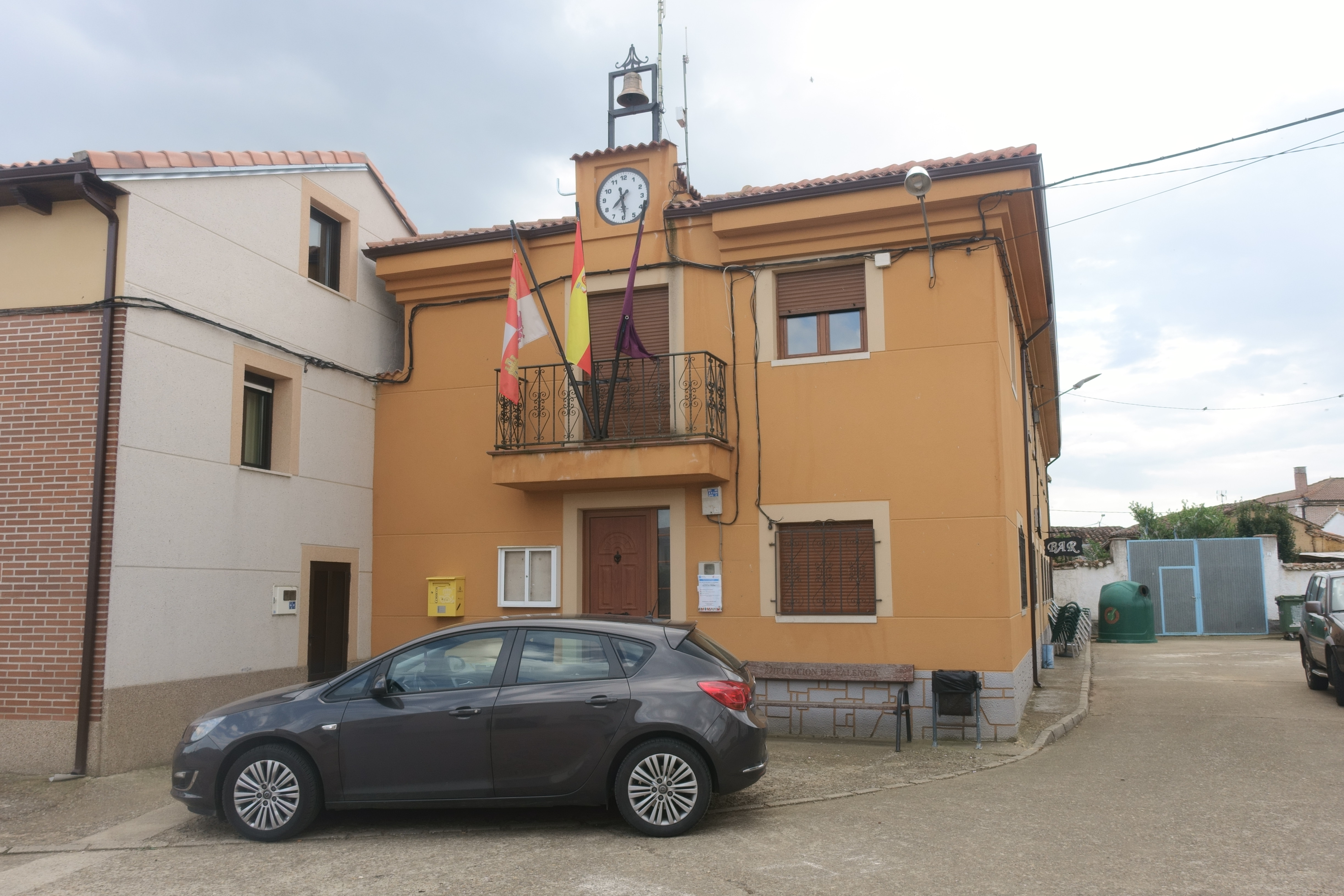 Casa consistorial de Villota del Páramo (Palencia, España).